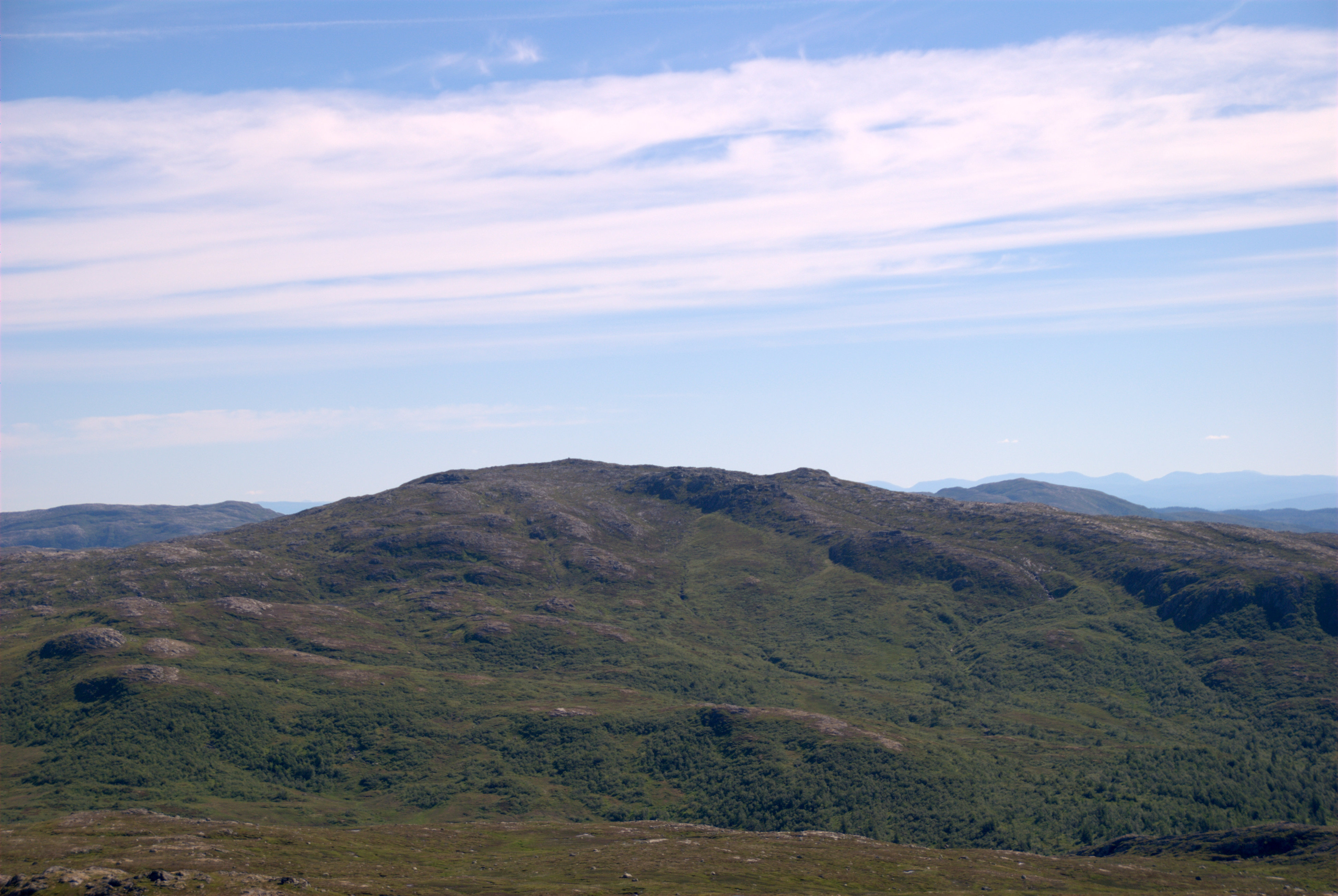 Finnvollheia (Raassje) 675 moh sett fra Dåapma. Finnvollheia med sin topp danner grensepunkt mellom kommunene Åfjord i Sør-Trøndelag og Namdalseid i Nord-Trøndelag. Finnvollheia er høyeste punkt i Åfjord kommune.